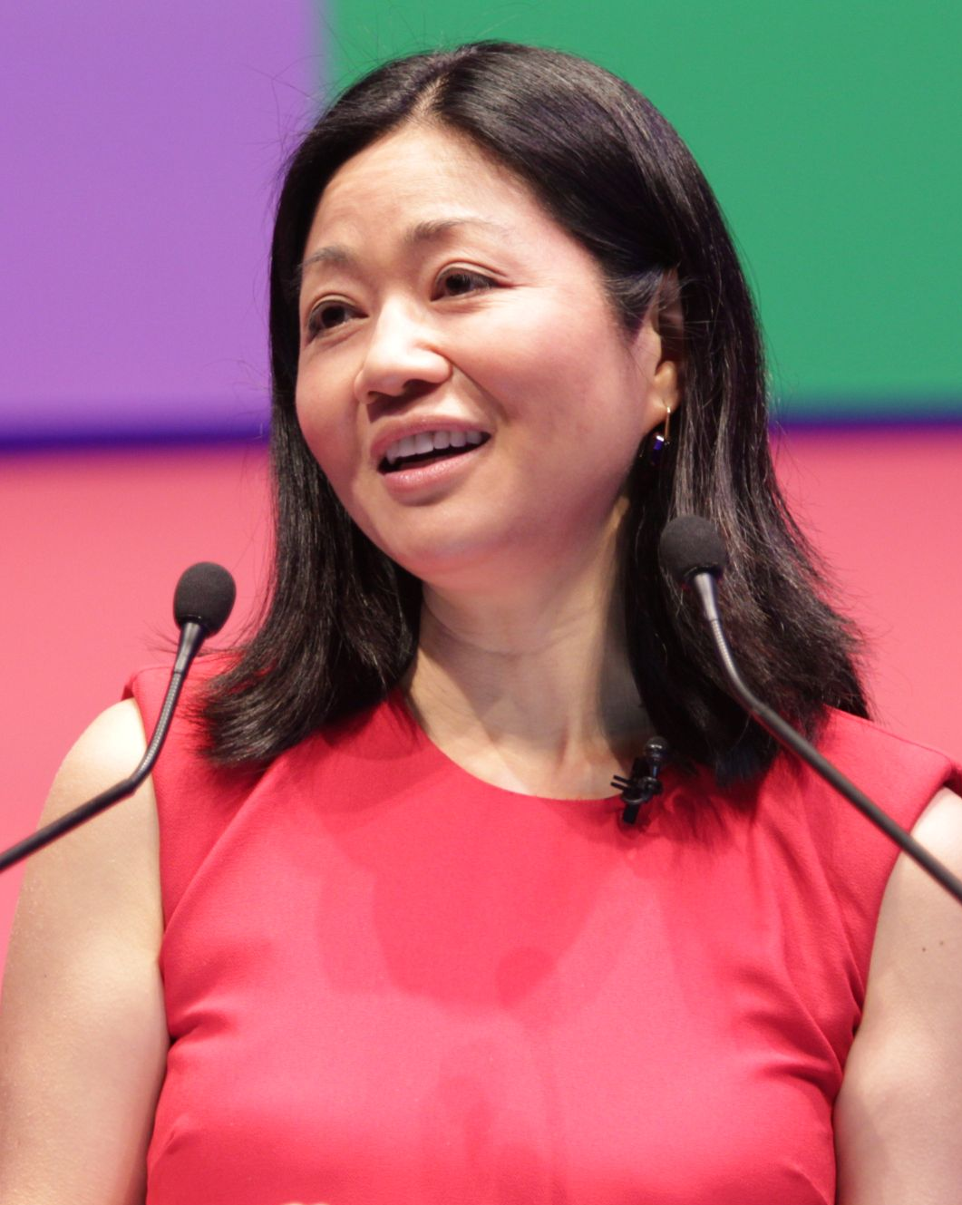 Linda Yueh Journalist & Presenter WTTC Global Summit 2017